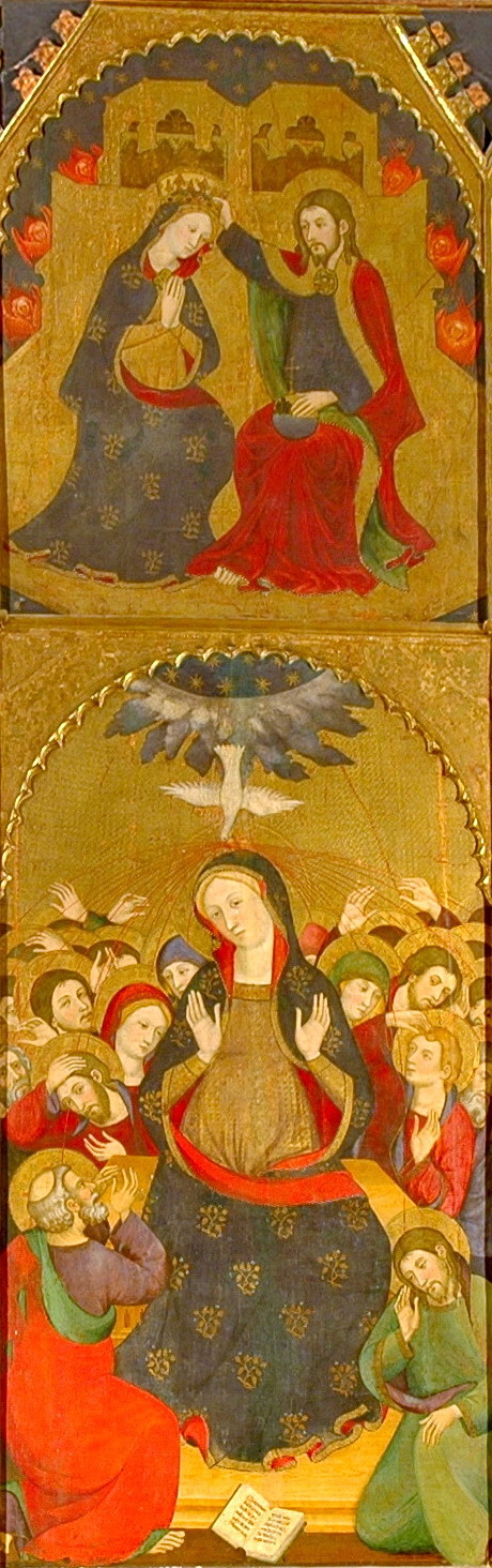 Retaule del Sant Esperit de la Seu de Manresa. Carrers del costat dret.